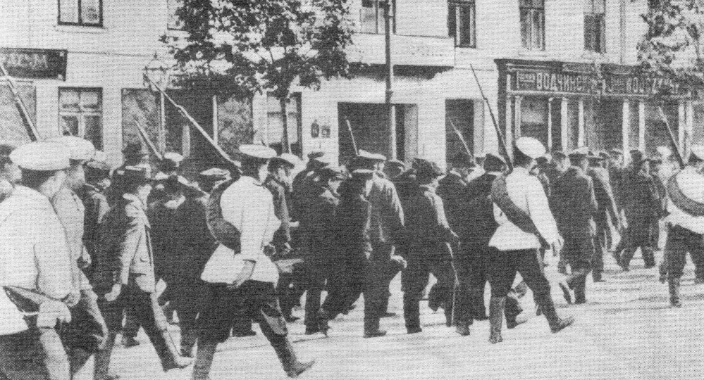 Rewolucja 1905-1907. Masowe aresztowanie w Białymstoku.